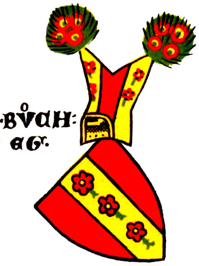 Wappen der Buocheg